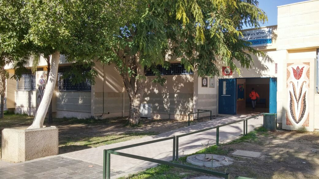 אורט ספיר ירוחם